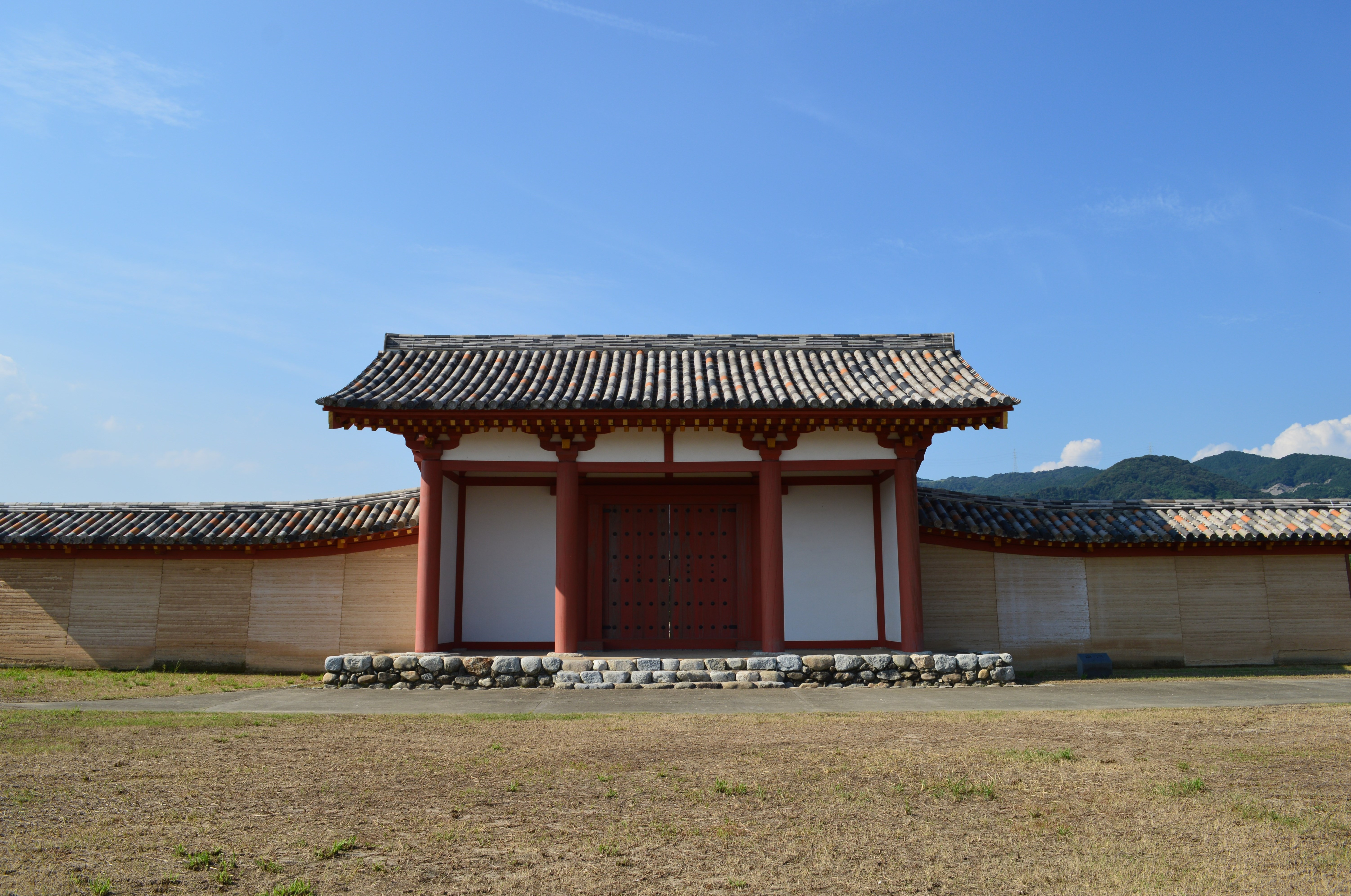 肥前国庁跡 南門正面